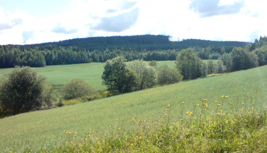 Toverudbekken på Lierfoss i Aurskog-Høland kommune.